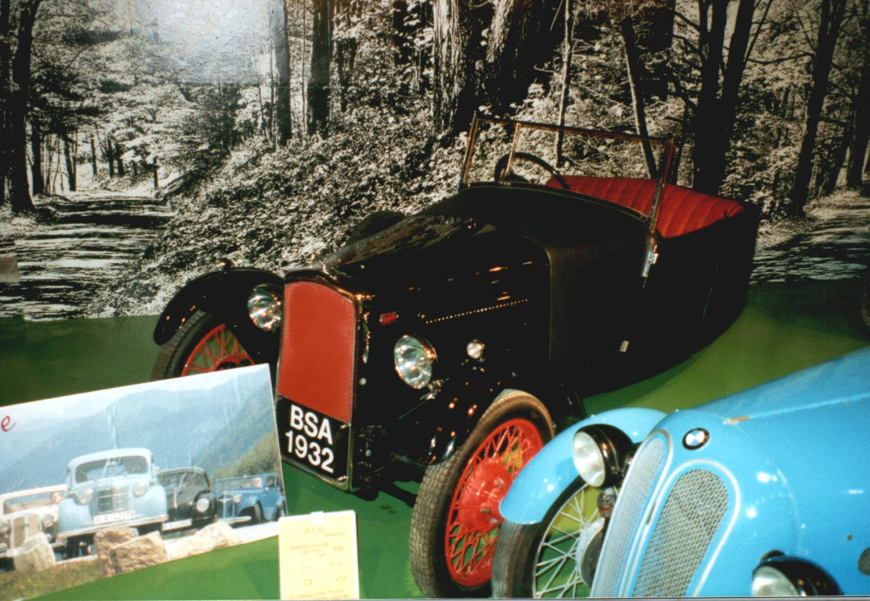 BSA 1932